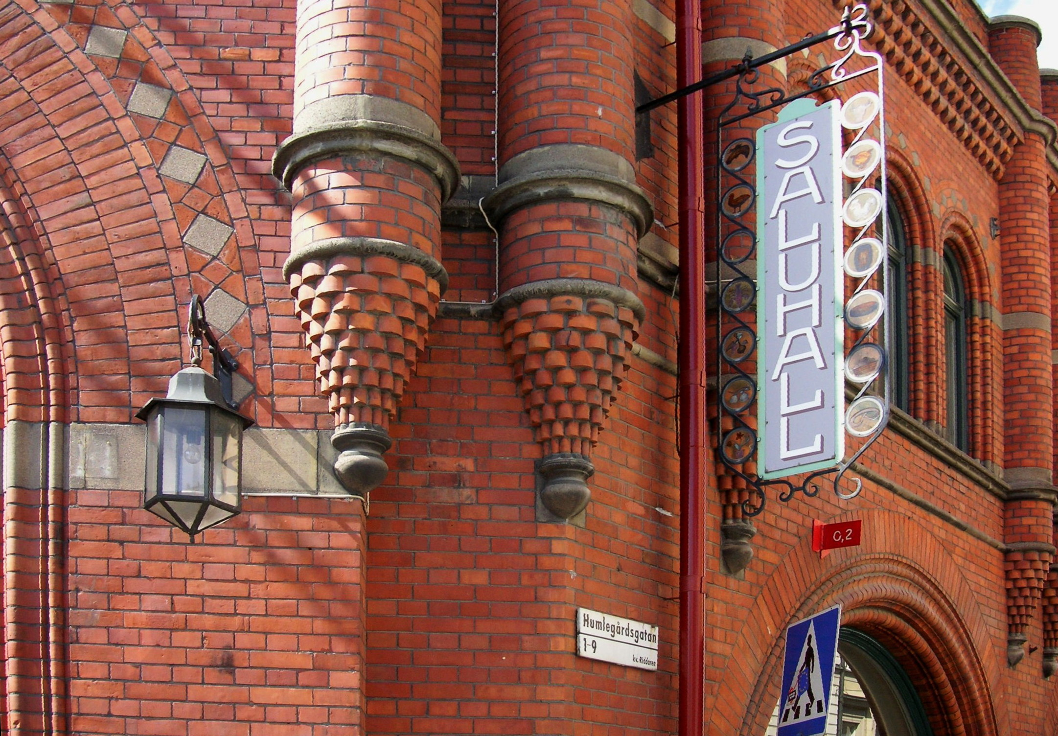 Humlegårdsgatan, Östermalmshallen in Stockholm